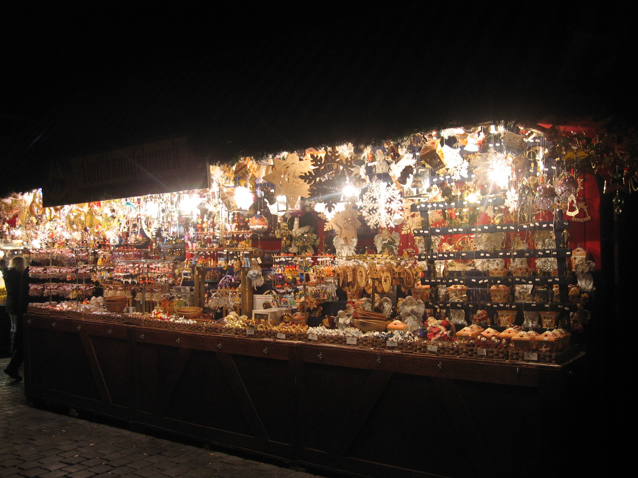 Verkaufsstand am Nürnberger Christkindlesmarkt